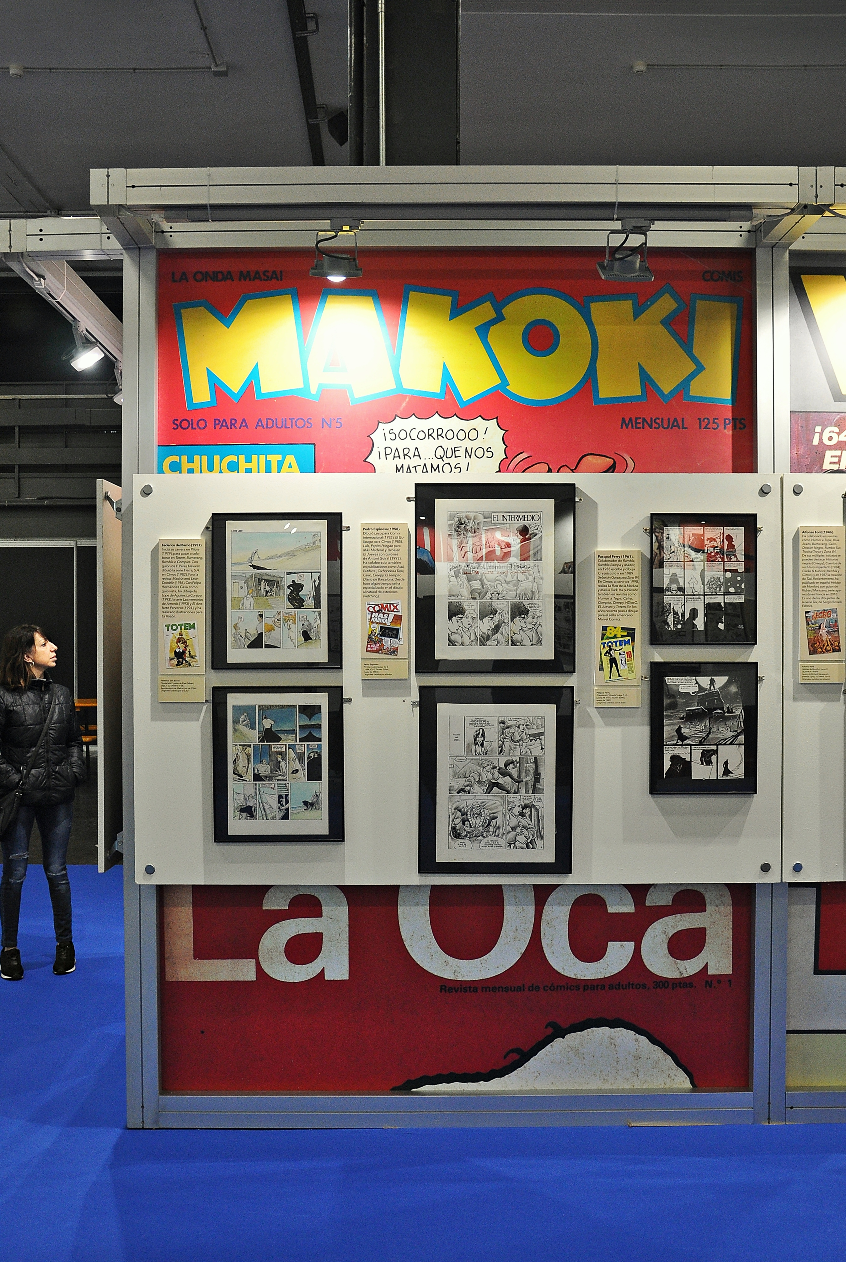 La revistas del Boom del Cómic